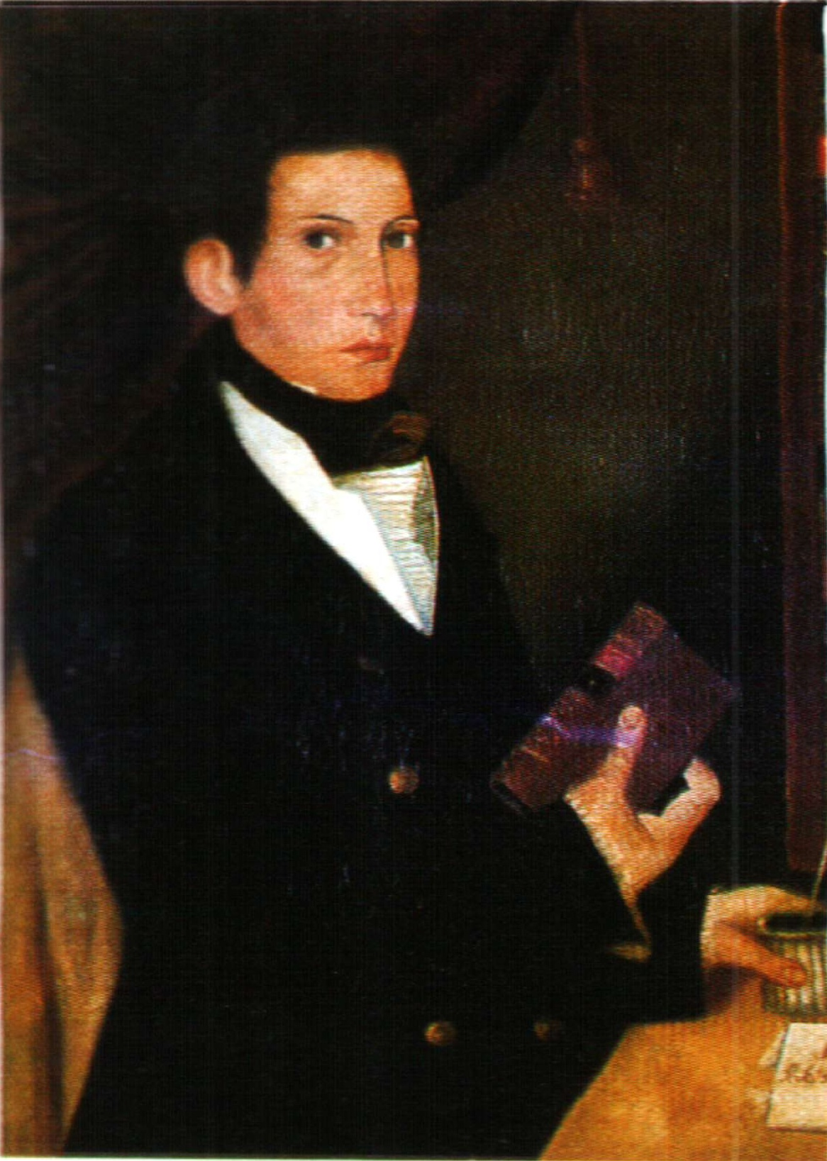 Ritratto di Giovan Francesco Pugliese